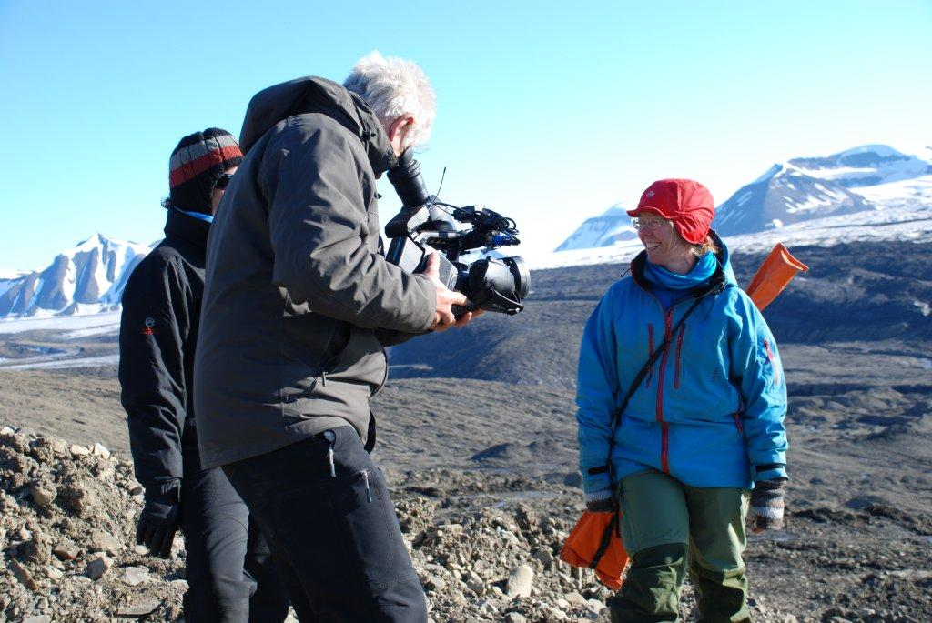 Astrid Lyså og Eiliv Larsen fra NGU deltar i TV-serien La valse des continents (Kontinentenes vals), som i juni ble vist på den franske TV-kanalen Arte. NGU-forskerne forteller om is og landskapsutvikling på Svalbard.